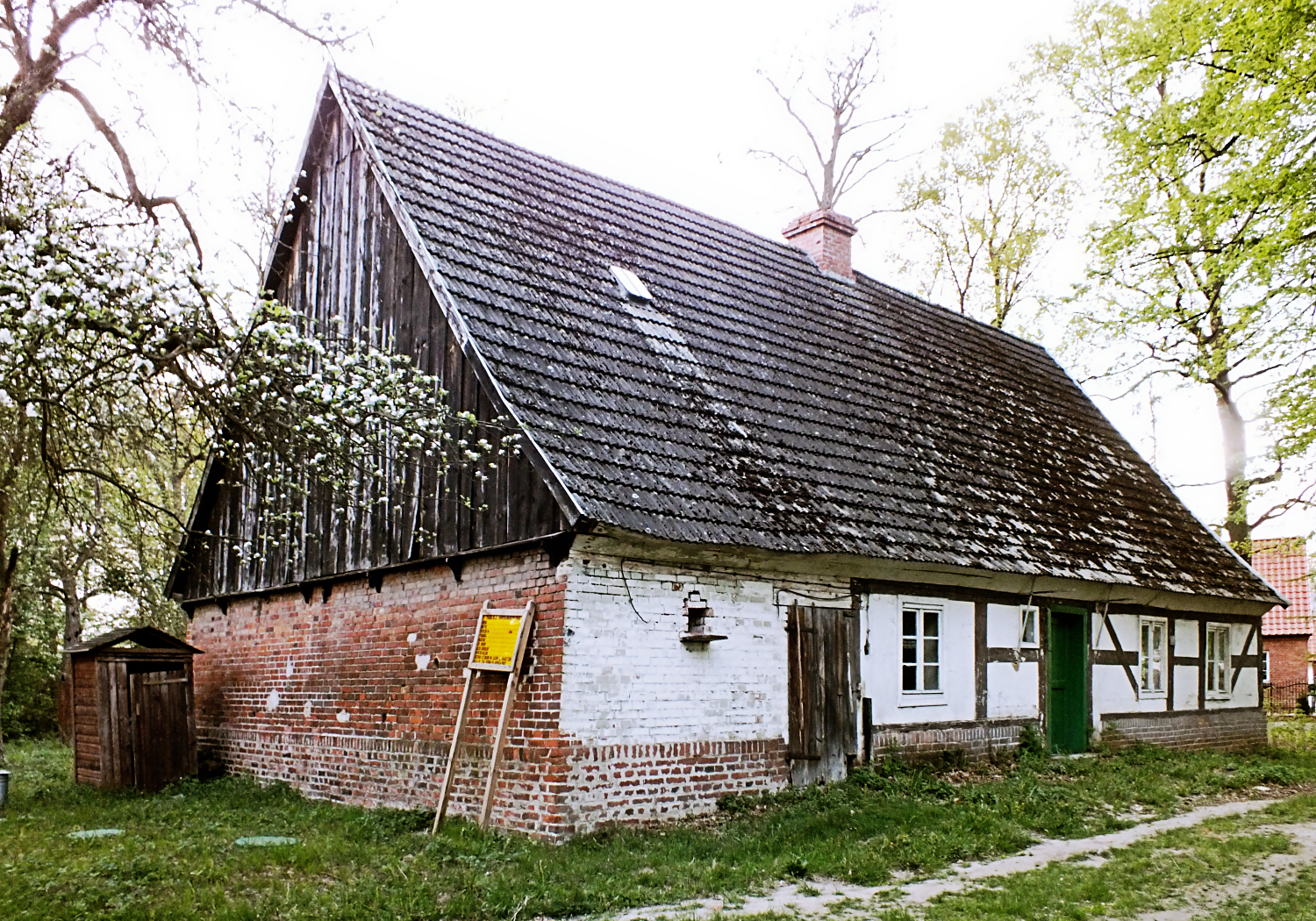 Ruda Milicka, gajówka Lasów Państwowych, dawna leśniczówka milickiej gałęzi rodu Maltzanów; XIX w.; pruski mur, częściowo szachulec